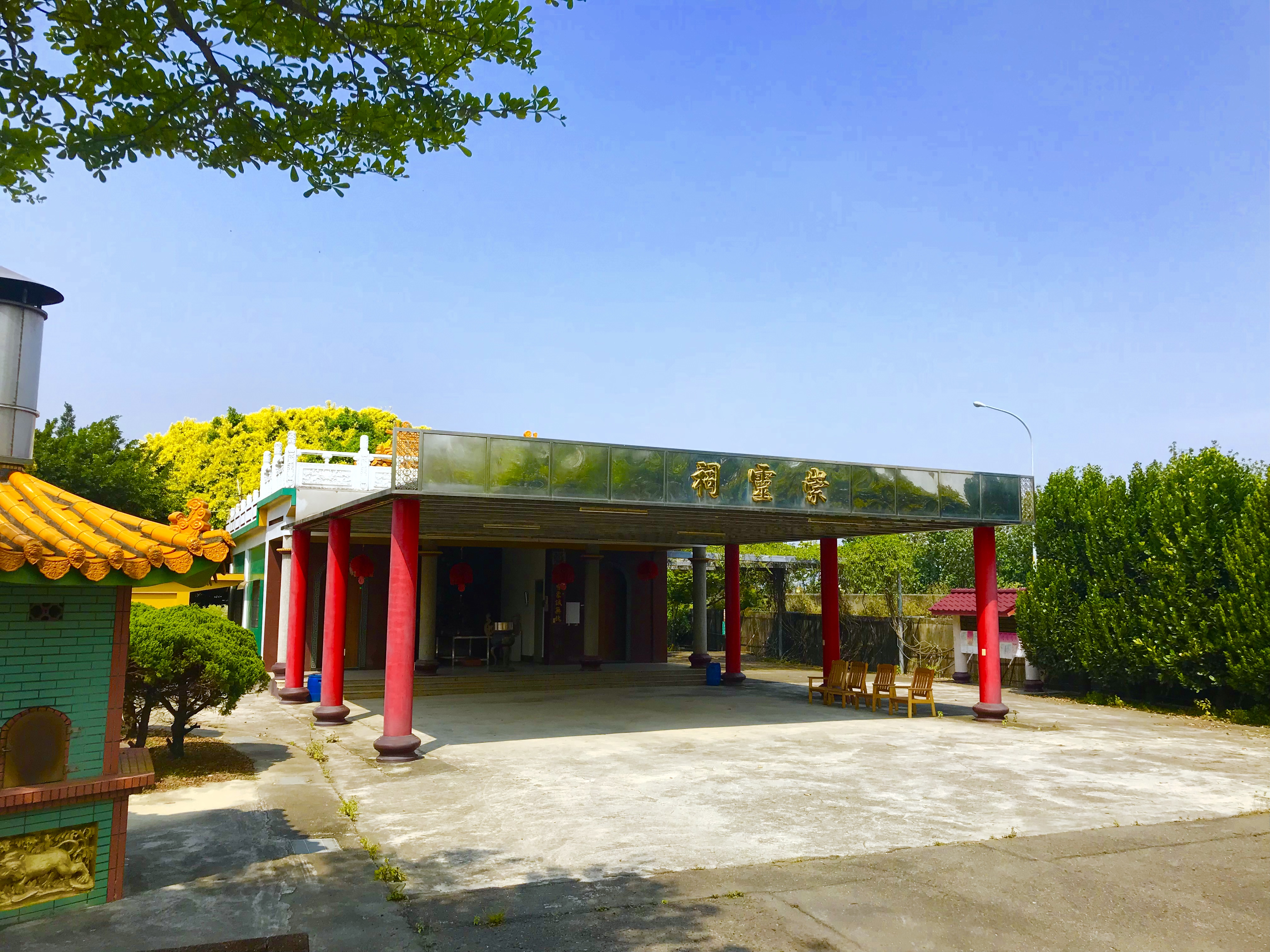 中文（台灣）: 瓦磘崇靈祠一景